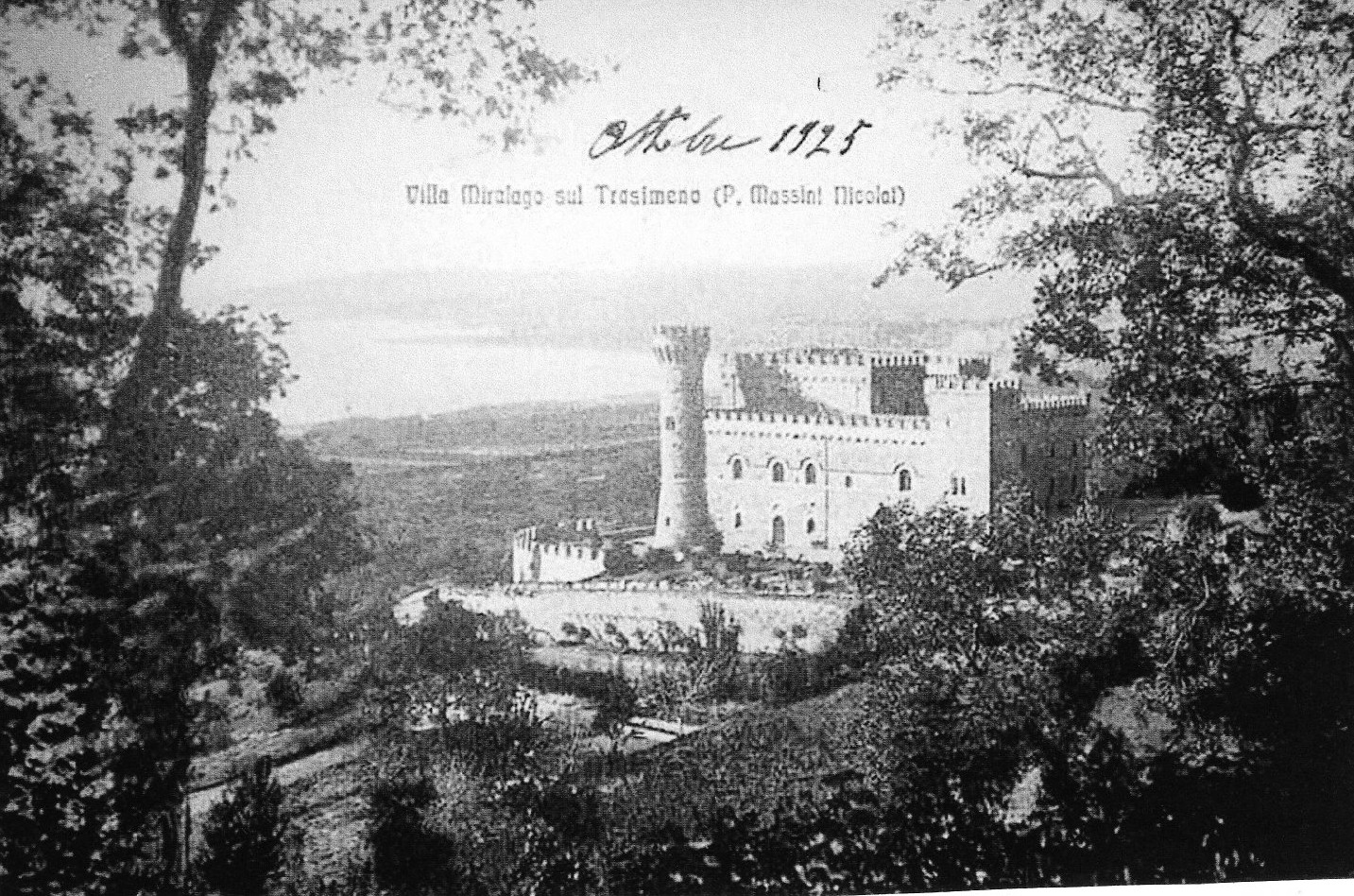 Villa Miralago sul Trasimeno (Passignano)